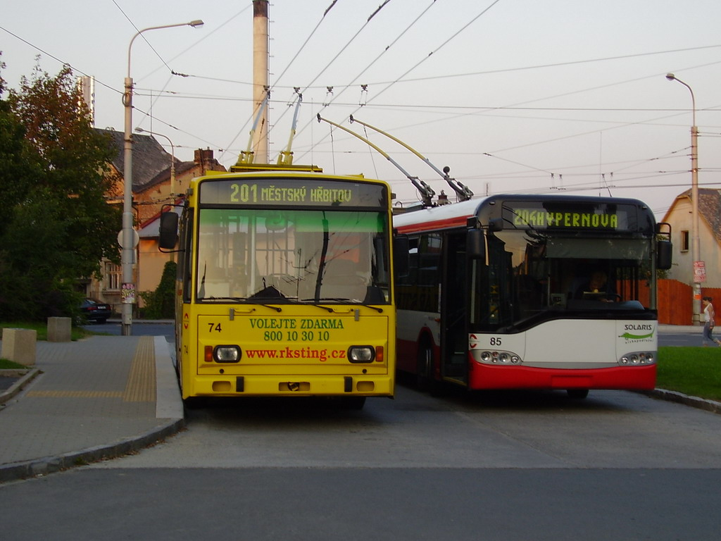 Na levé straně trolejbus Škoda 14TrM, na pravé nízkopodlažní trolejbus Solaris Trollino 12. Snímek pořízen v Opavě. Foto: Miroslav Puchalter